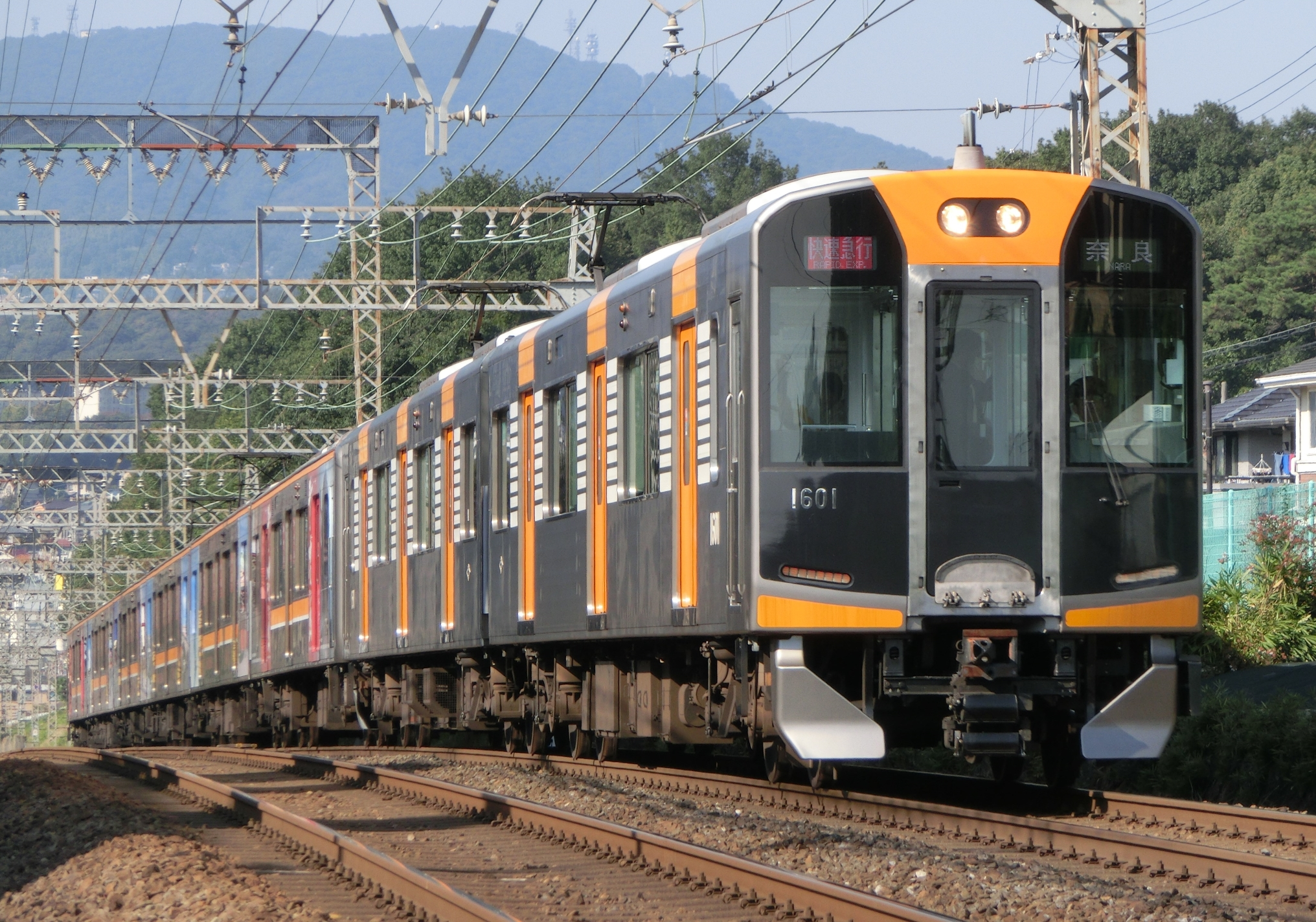 阪神1000系1601F_HT01編成+9000系9203F_HQ04編成 撮影：富雄駅～学園前駅間